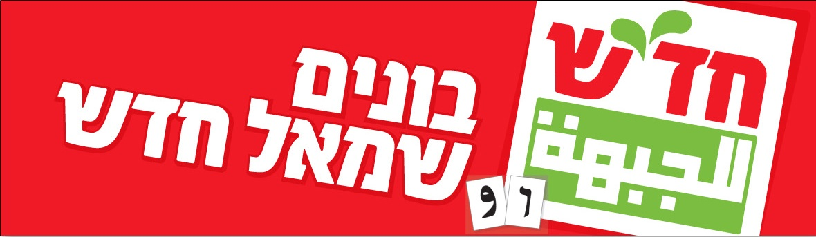 תעמולת בחירות של חד"ש 2009